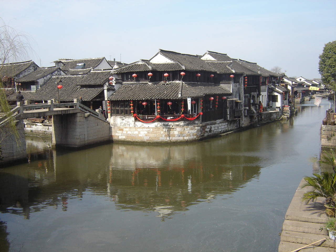 Eine der Wasserstraßen von Xitang